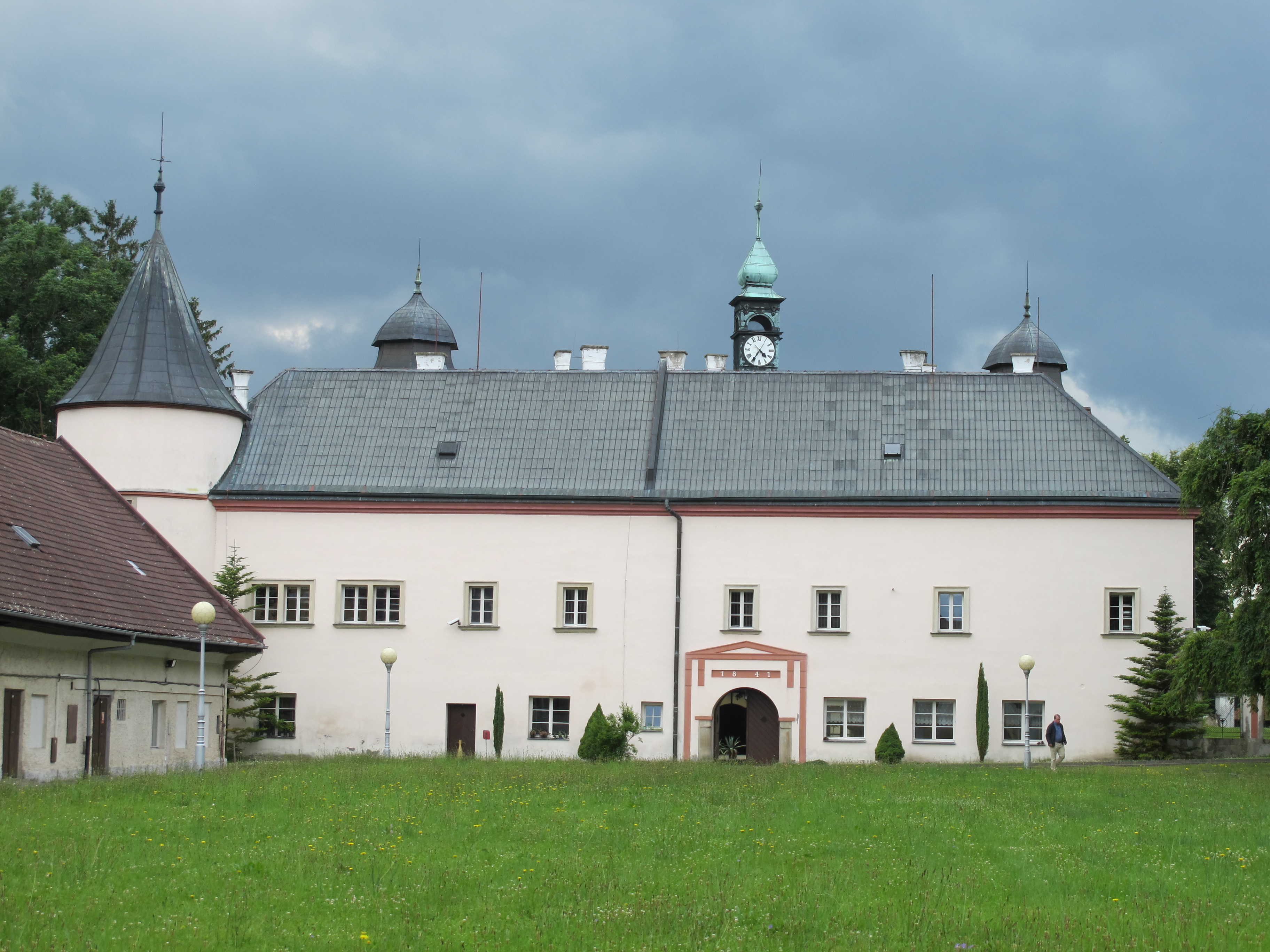 Zámek v Zámrsku, sídlo SOA Zámrsk.